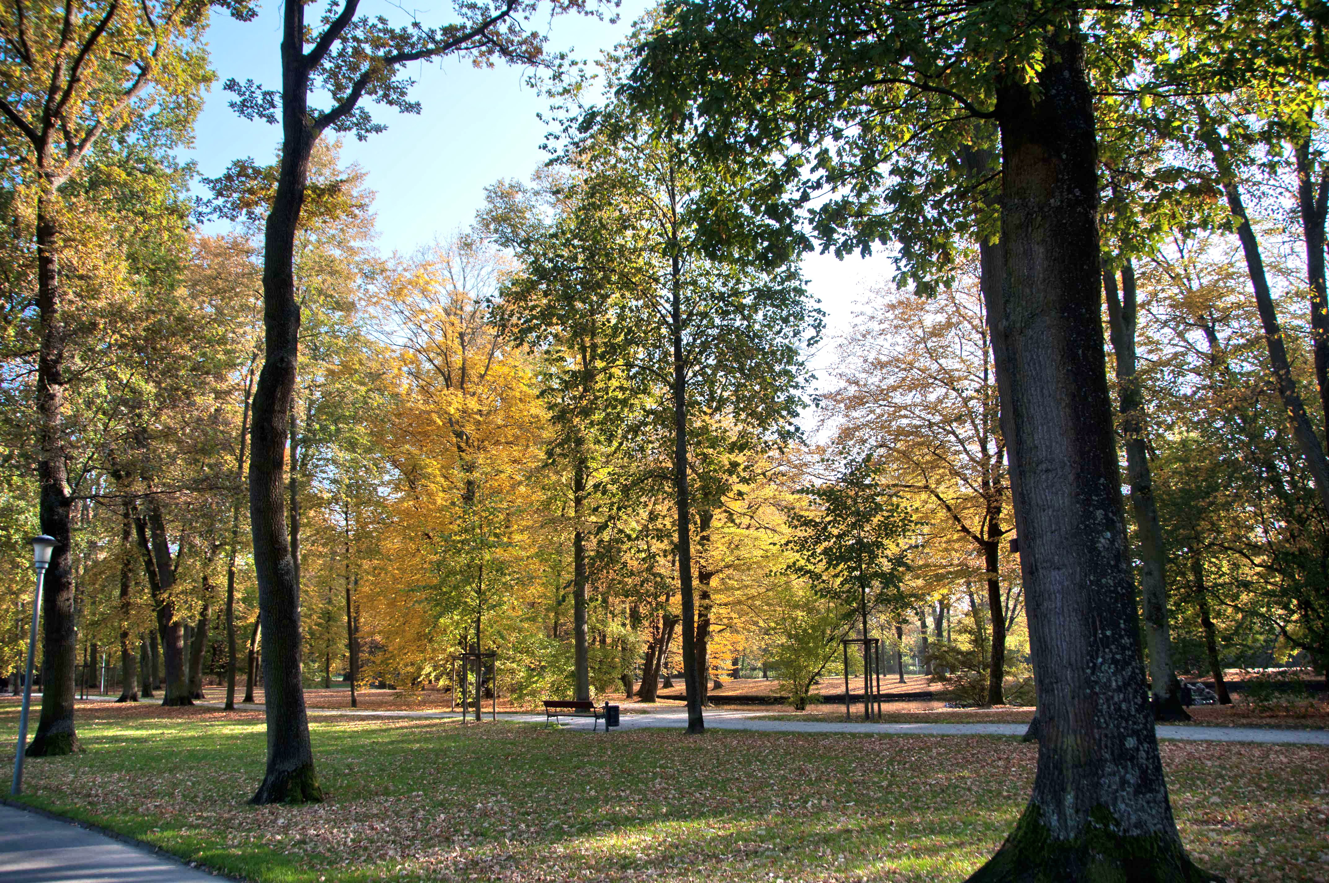 Bayreuth, Hofgarten